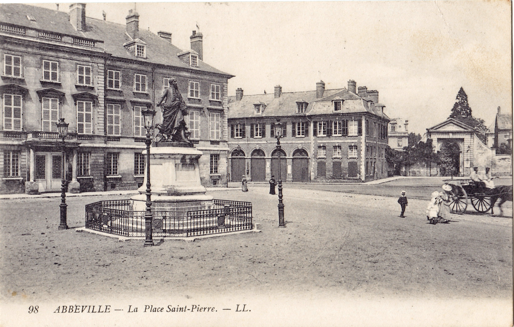 Carte postale ancienne éditée par LL, n°98 : ABBEVILLE - La Place Saint-Pierre